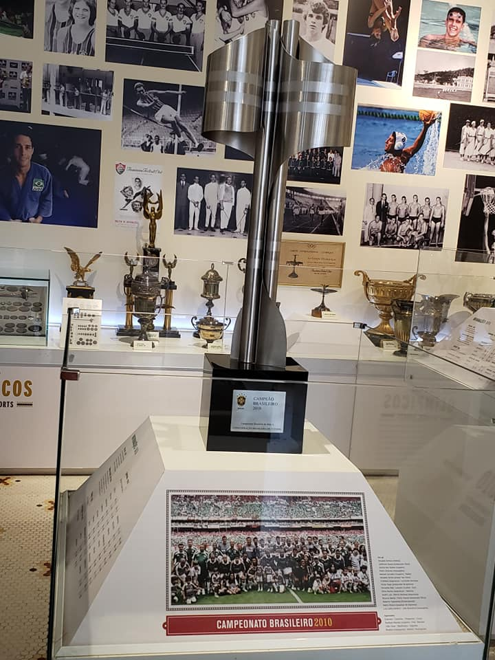 Taça do Campeonato Brasileiro de Futebol de 2010 Primeira Divisão